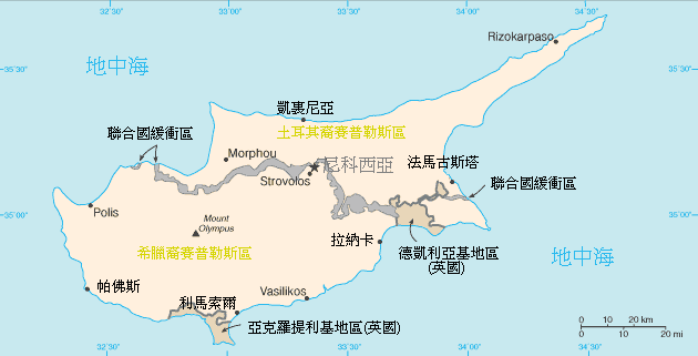 賽普勒斯地圖. 在這幅塞浦路斯島的地圖上，可以看到灰色的聯合國緩衝區貫穿全島，將島上分隔為南北兩地區。.